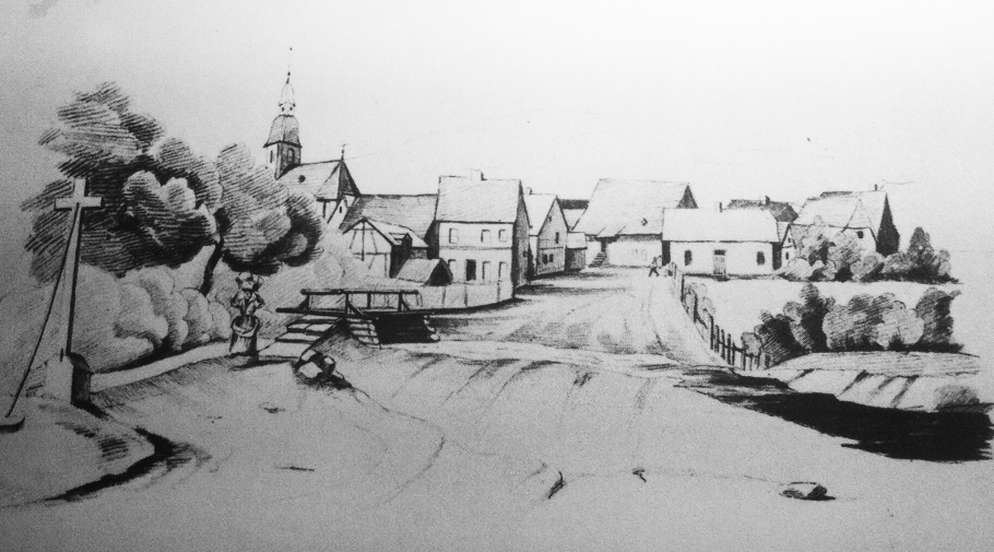 Zeichnung der Langstraße. Im Vordergrund ist der Fischbach zu erkennen. Es führt nur ein schmaler Holzsteg über den Bach.